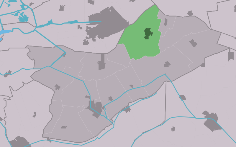 Kaartsje fan himrik fan Oerterp